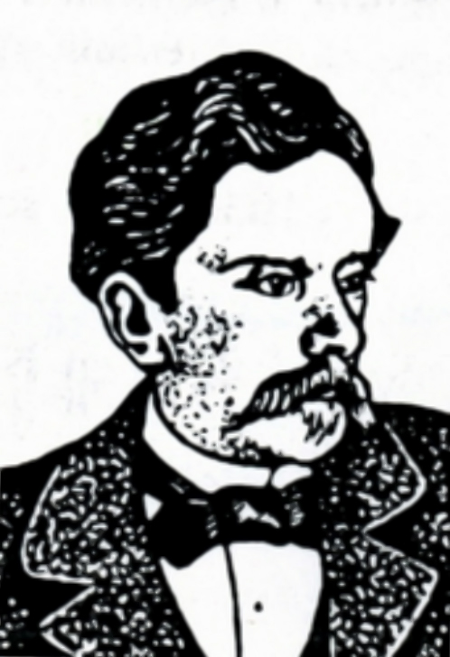 Dessin à l'encre de chine représentant Marc le Goupils